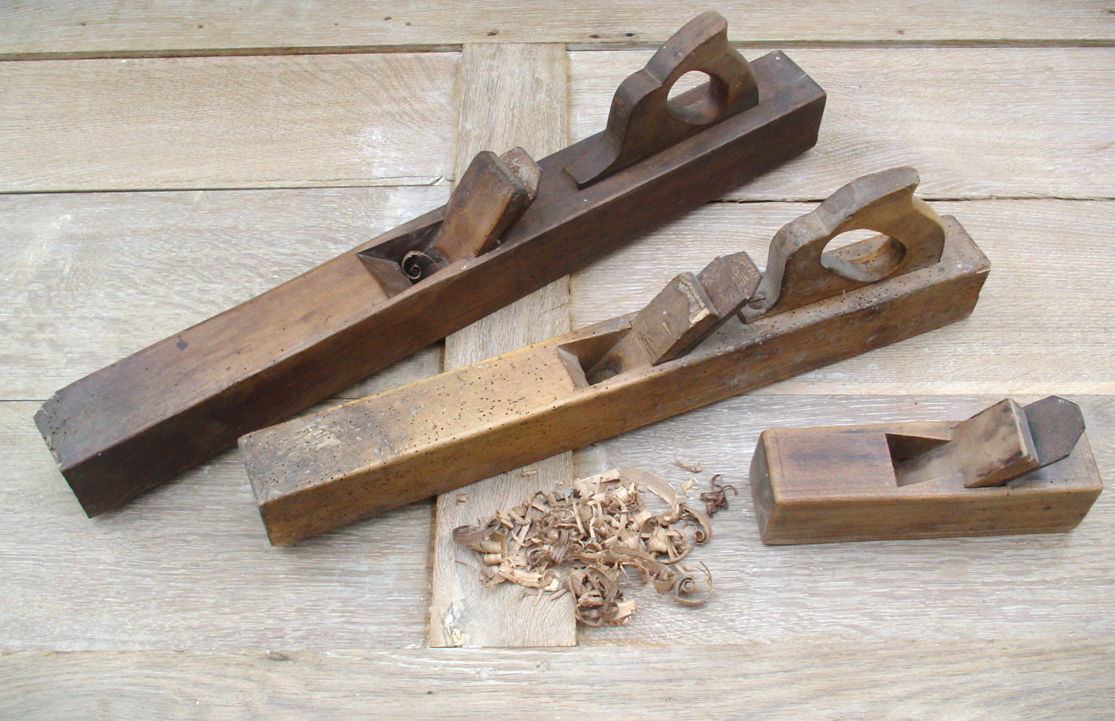 2 varlopes et un rabot. Echantillon de copeaux produits par ses outils sur du chêne.